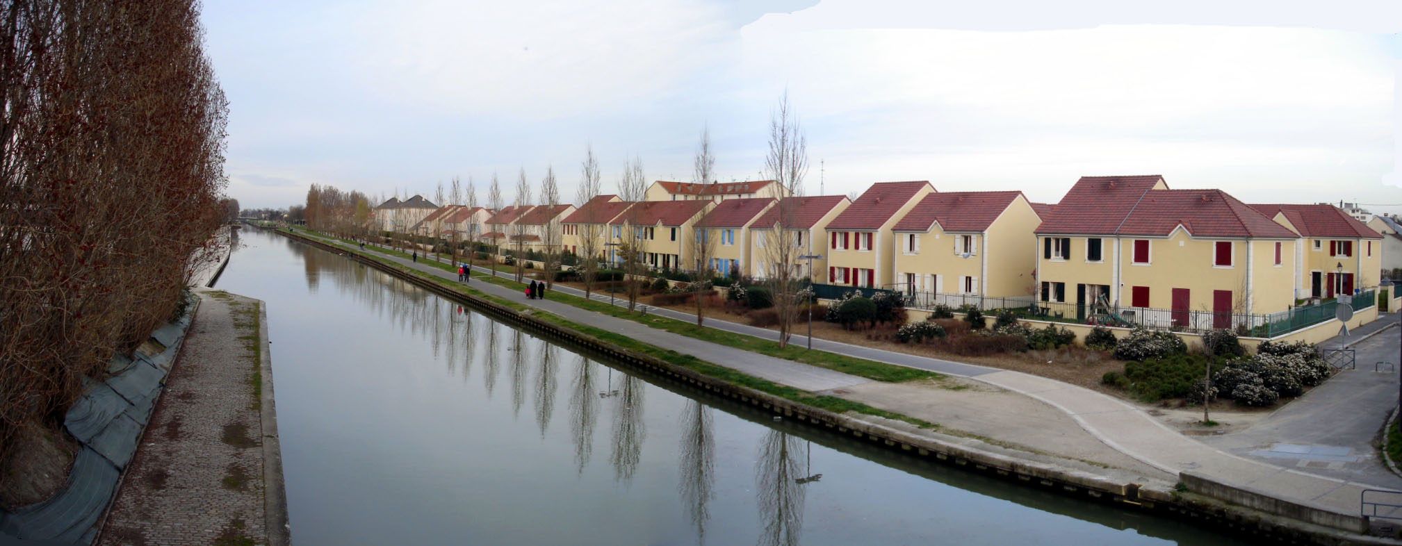 Les Pavillons-sous-Bois (France) - Le canal de l'Ourcq - mars 2007 Photo personnelle (own work) de clicsouris